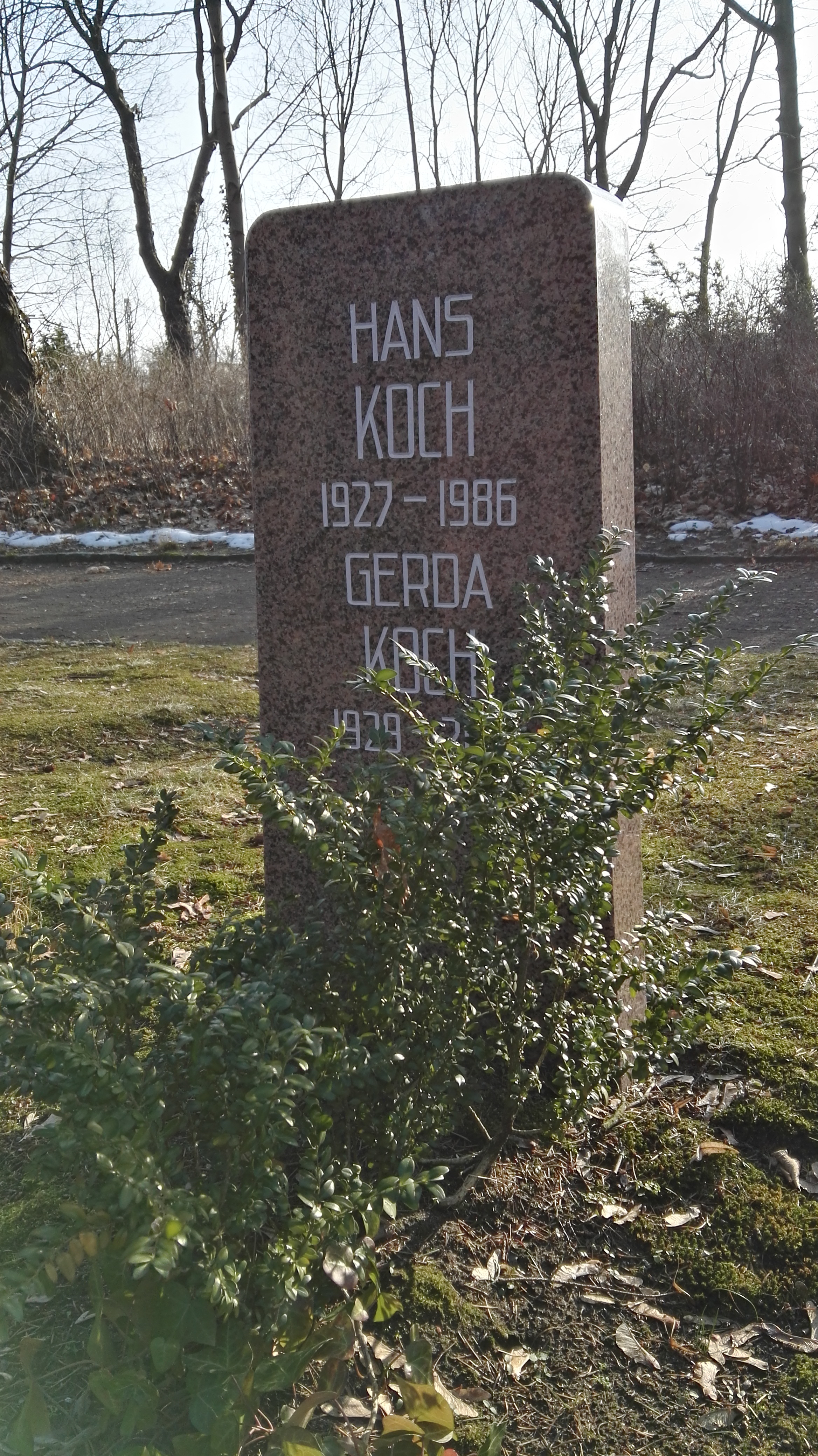 Grab von Hans Koch und Gerda Koch in der Grabanlage Pergolenweg auf dem Sozialistenfriedhof des Zentralfriedhofs Friedrichsfelde